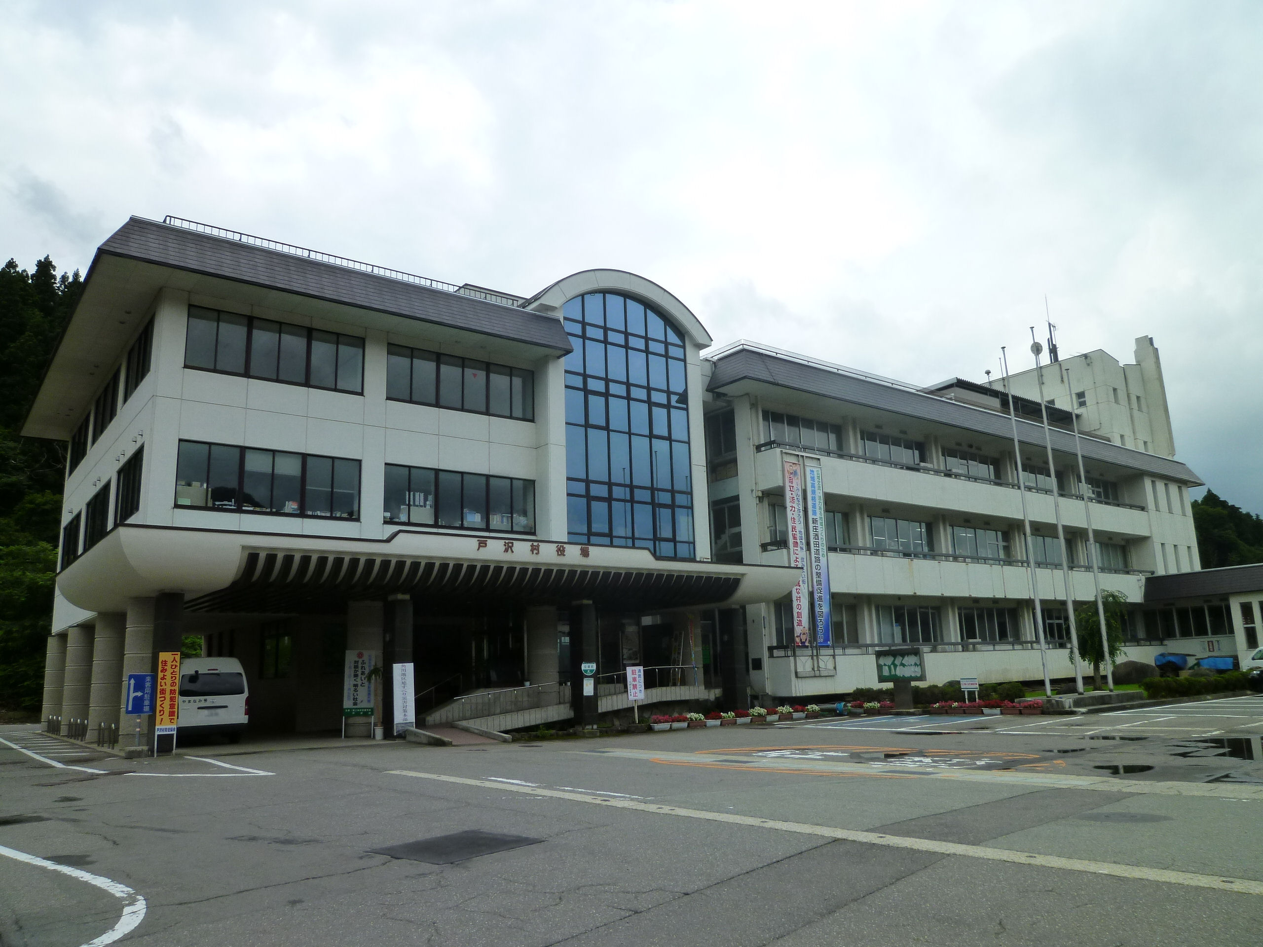 戸沢村役場。 山形県最上郡戸沢村古口に所在。